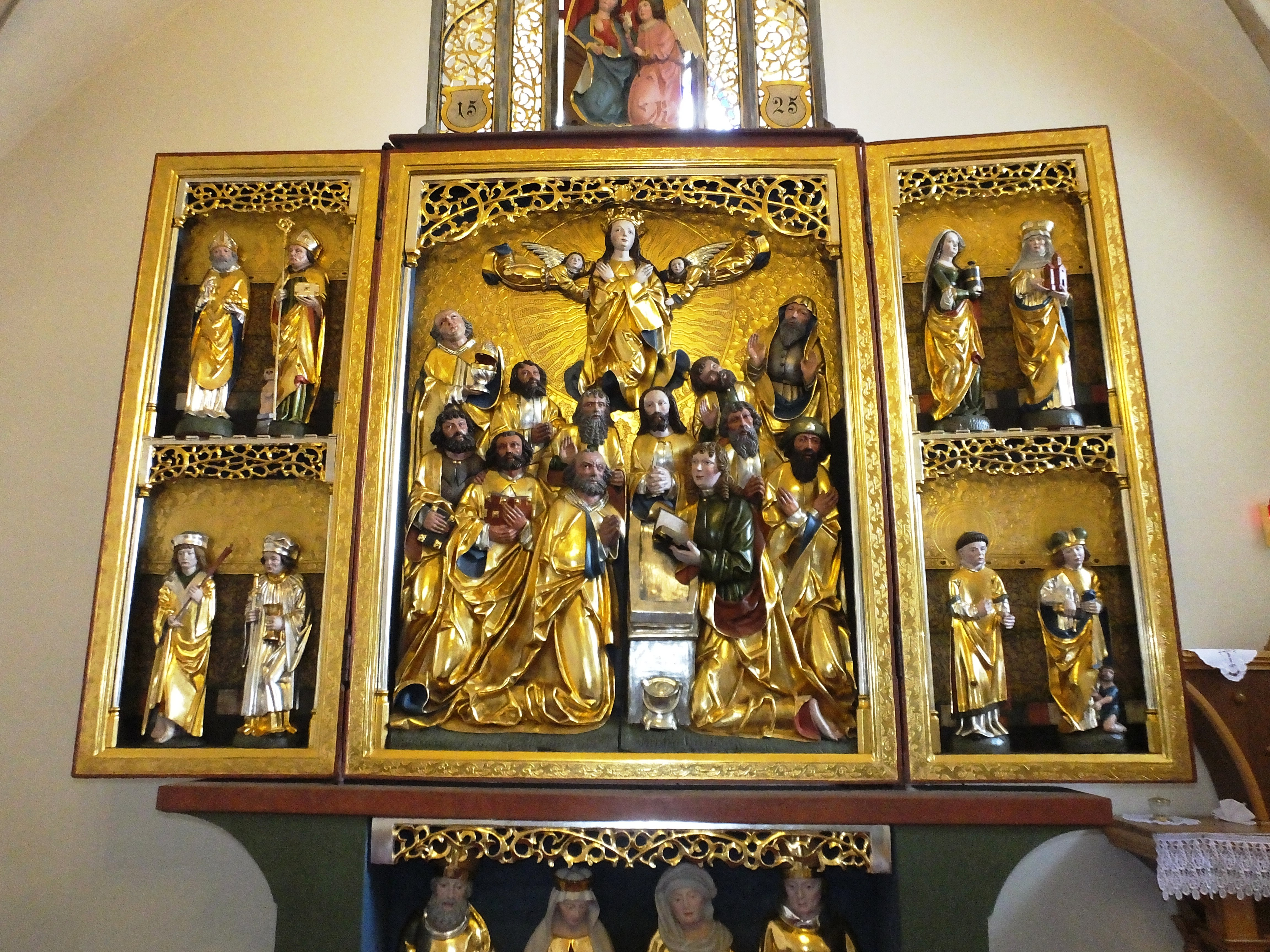 Ołtarz w Pisarzowicach k/Kamiennej Góry po renowacji.